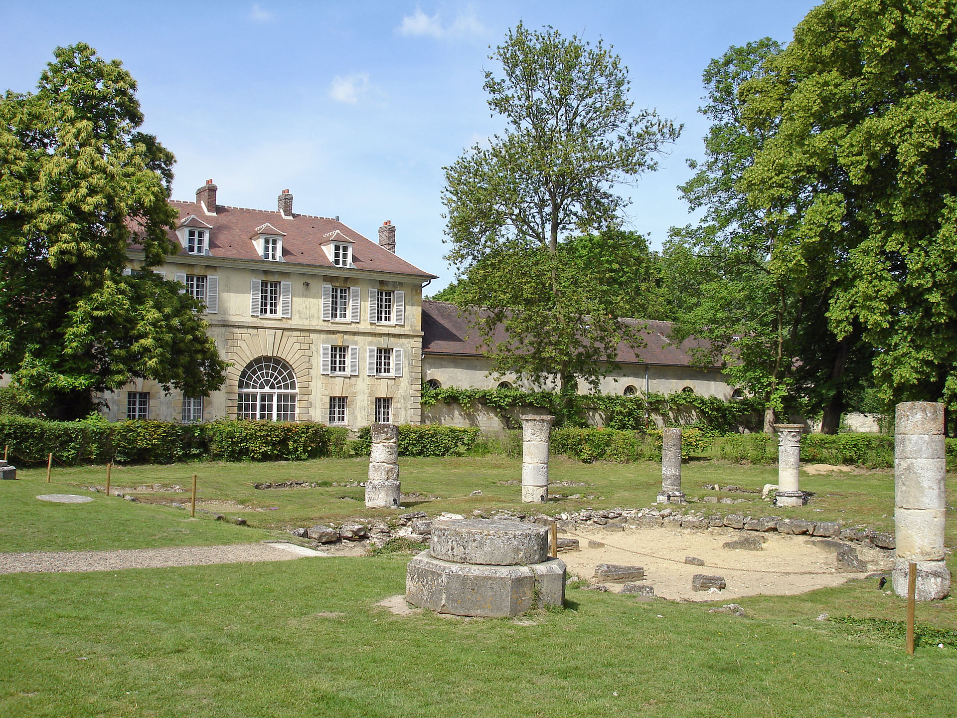 Ancien bâtiment industriel derrière le chœur disparu de l'église de l'abbaye de Royaumont, Val-d'Oise, France.